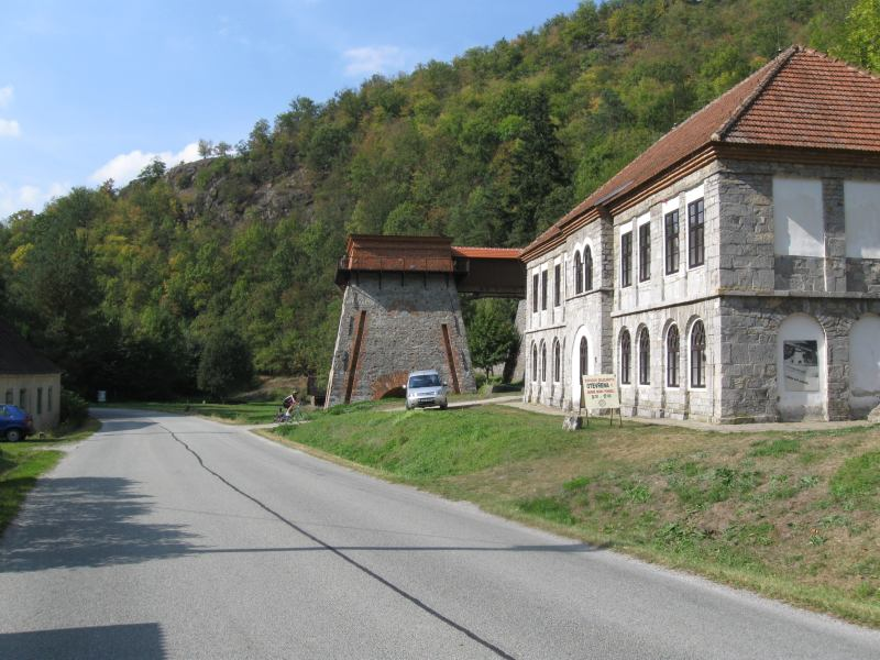 Huť Františka - muzeum železářství